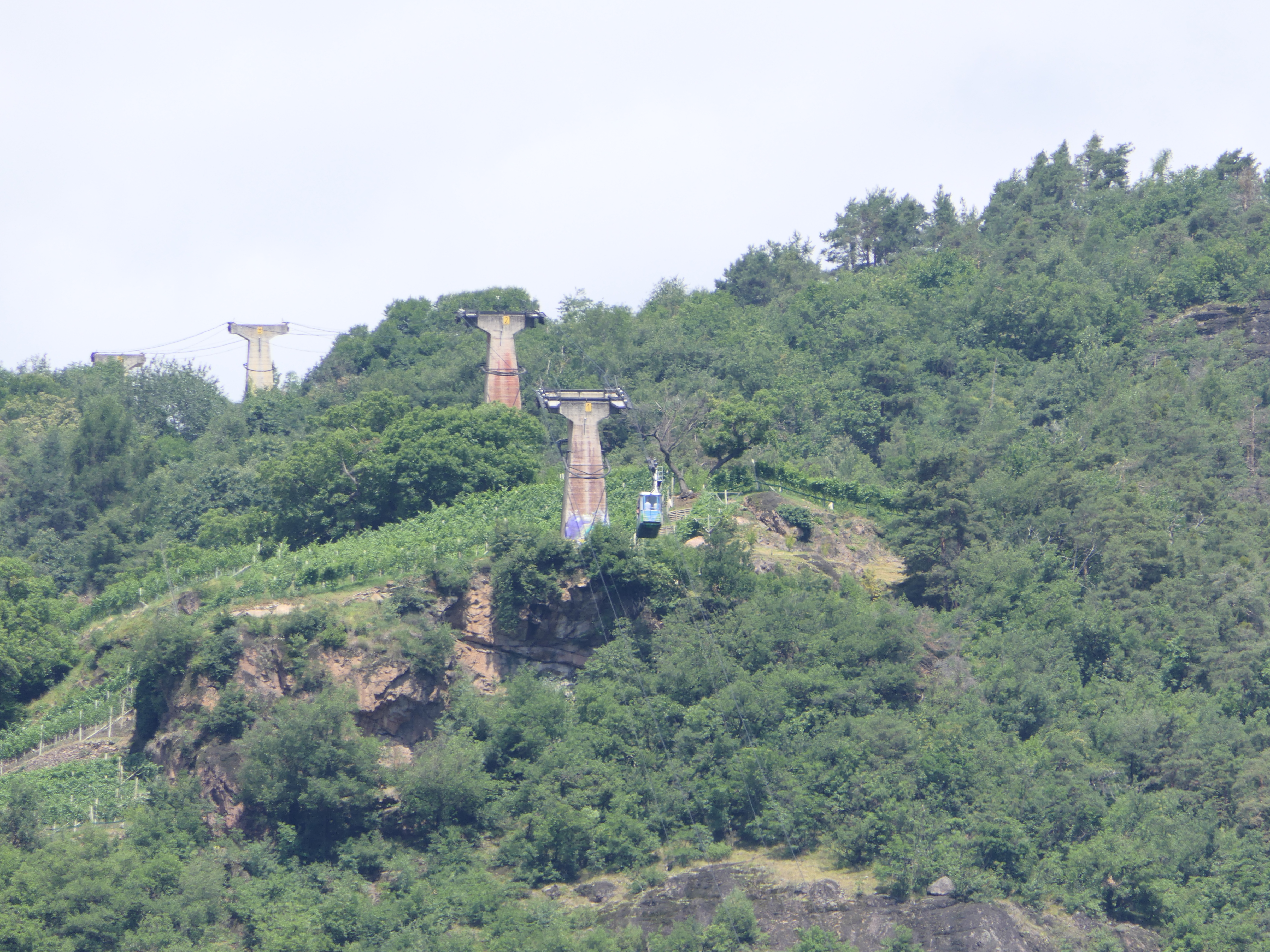 Die Seilbahn Jenesien, eine Luftseilbahn, die Bozen mit der Gemeinde Jenesien verbindet.